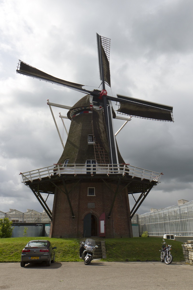 Metslawier: Koren- en pelmolen Ropta in de zeilen